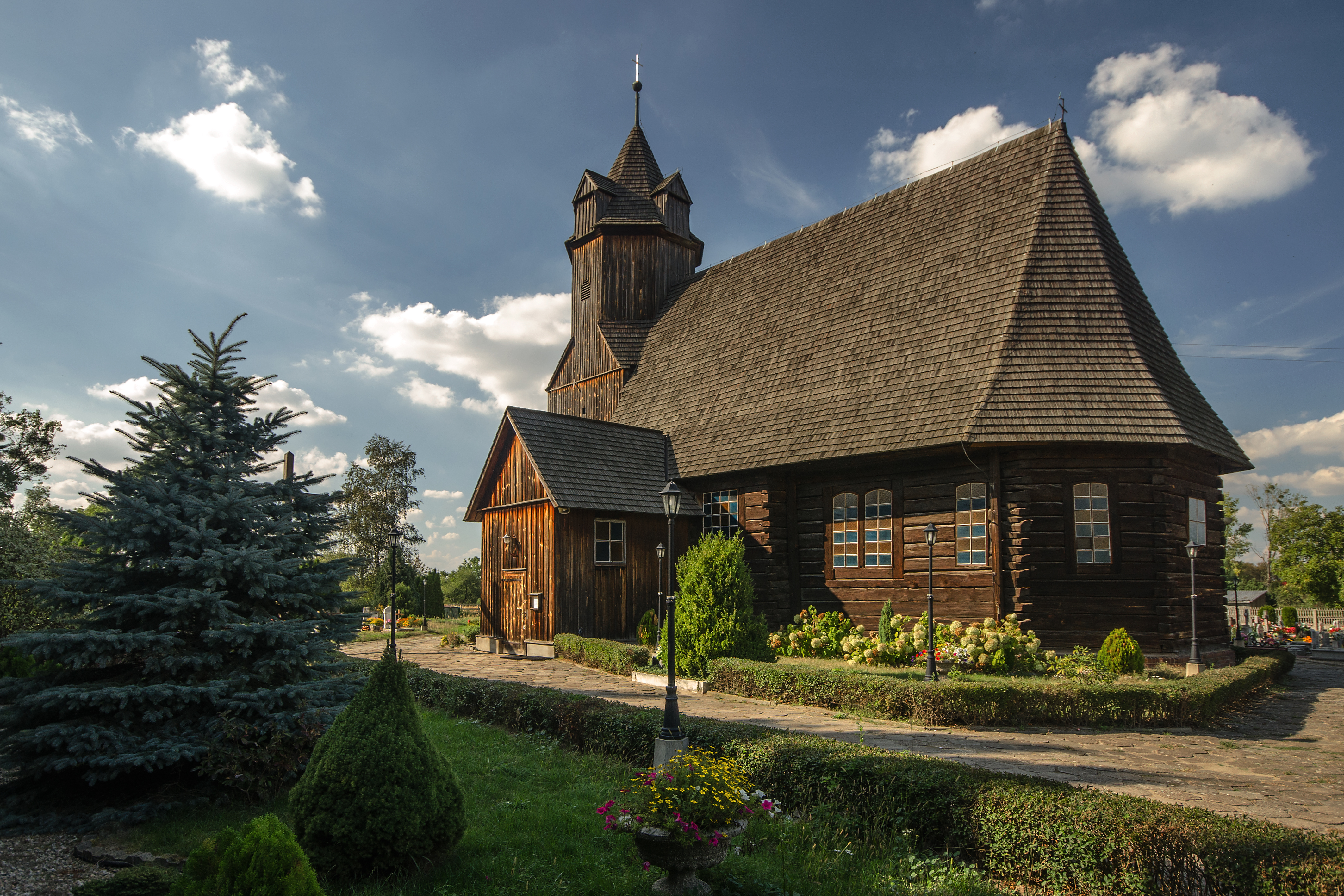 Krzywiczyny, kościół ewangelicki, ob. rzym.-kat. par. p.w. Św. Trójcy, 1623